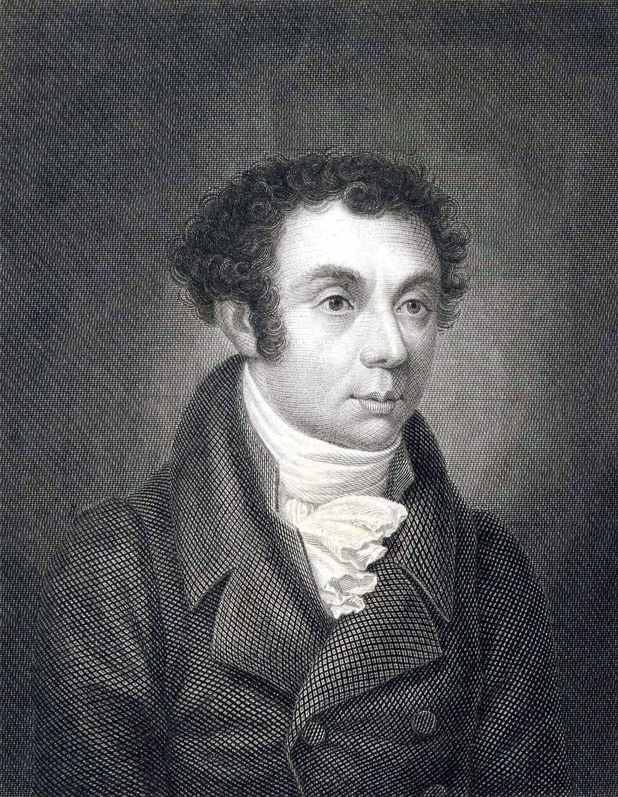 Heinrich August Schott (1780-1835) deutscher evangelischer Theologe}, Stahlstich-Porträt